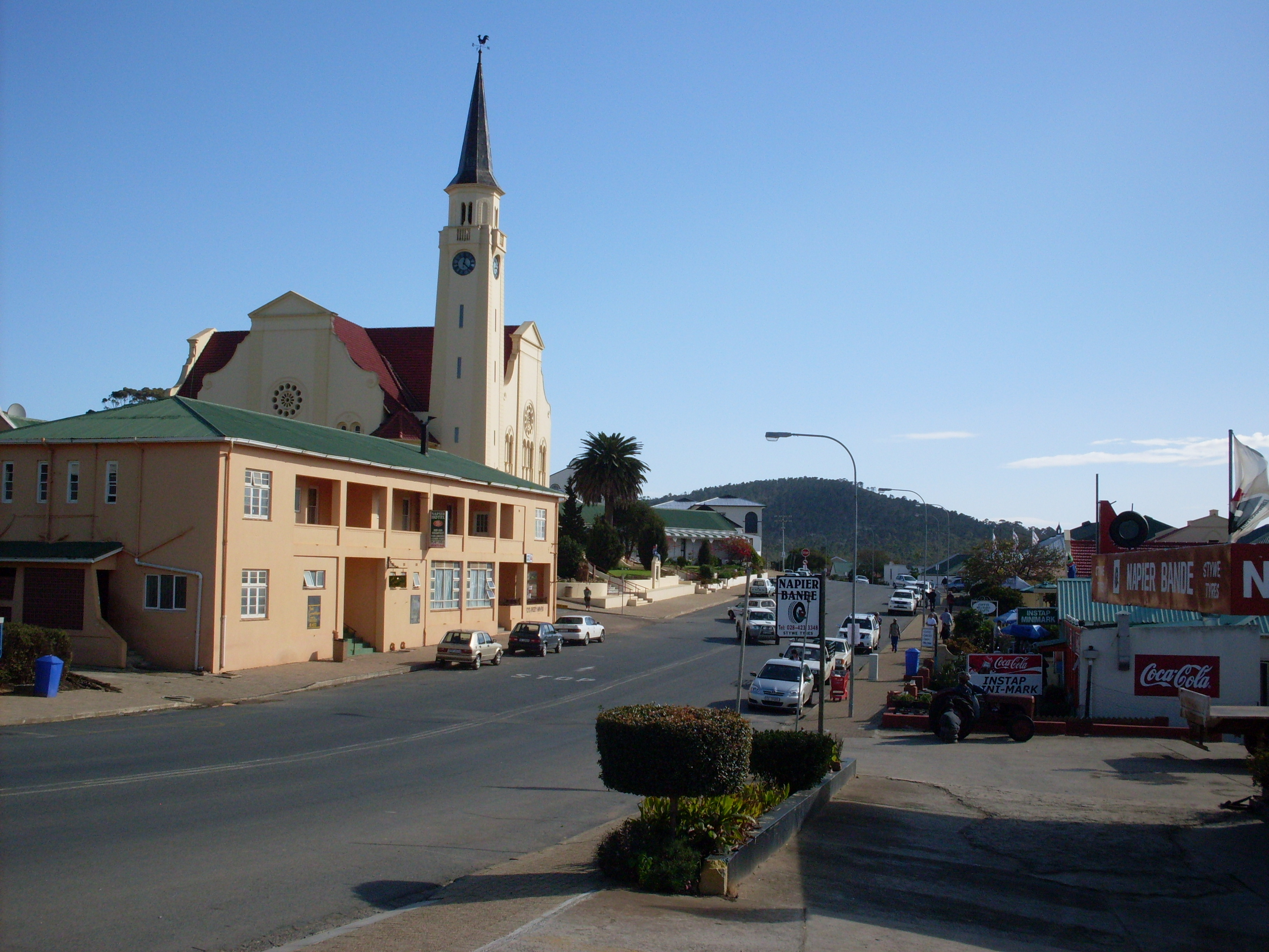 Sarel Cilliersstraat, Napier se hoofstraat.